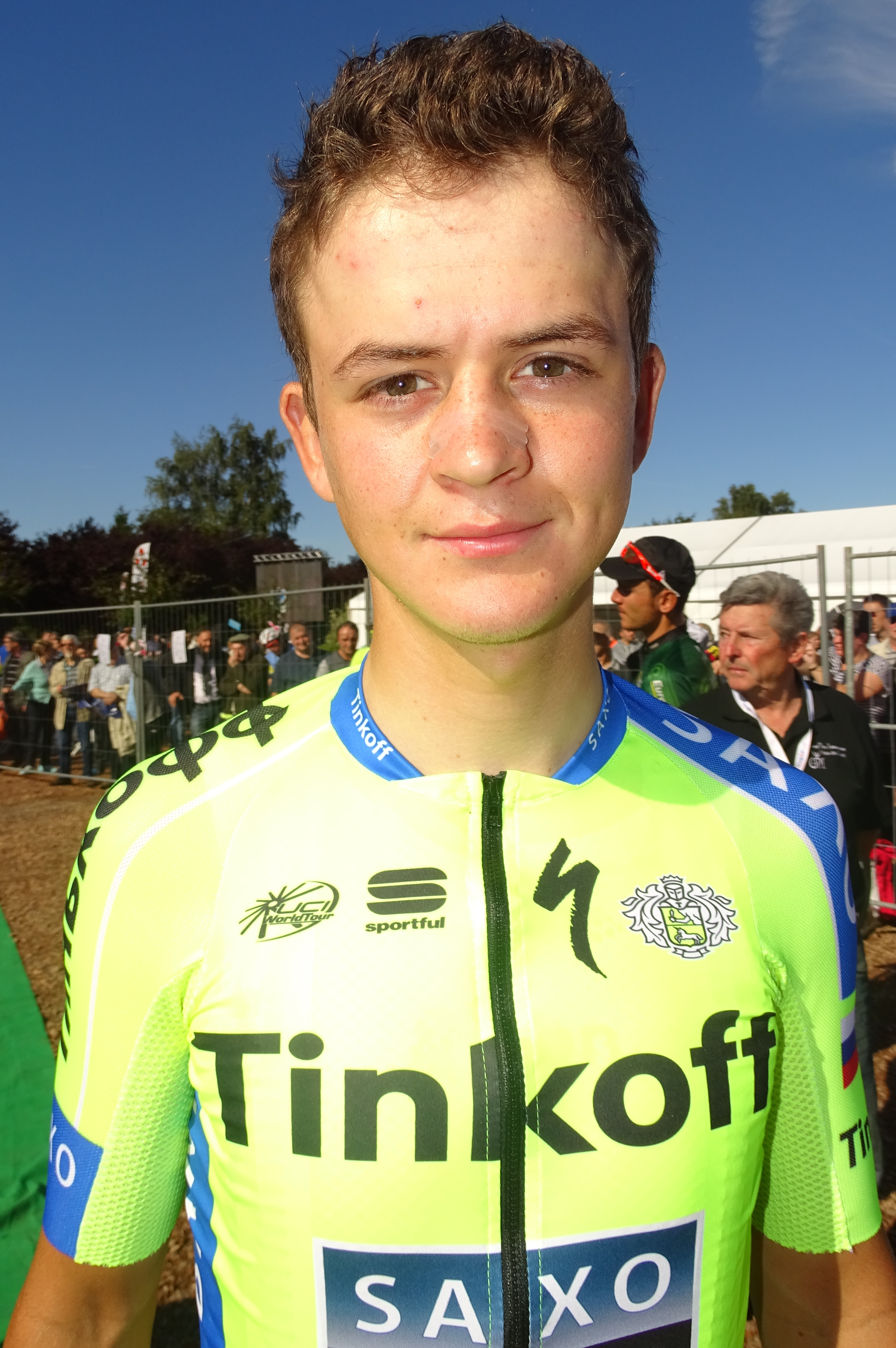 Reportage réalisé le dimanche 20 septembre à l'occasion du départ et de l'arrivée du Grand Prix d'Isbergues 2015 à Isbergues, Nord-Pas-de-Calais, France.